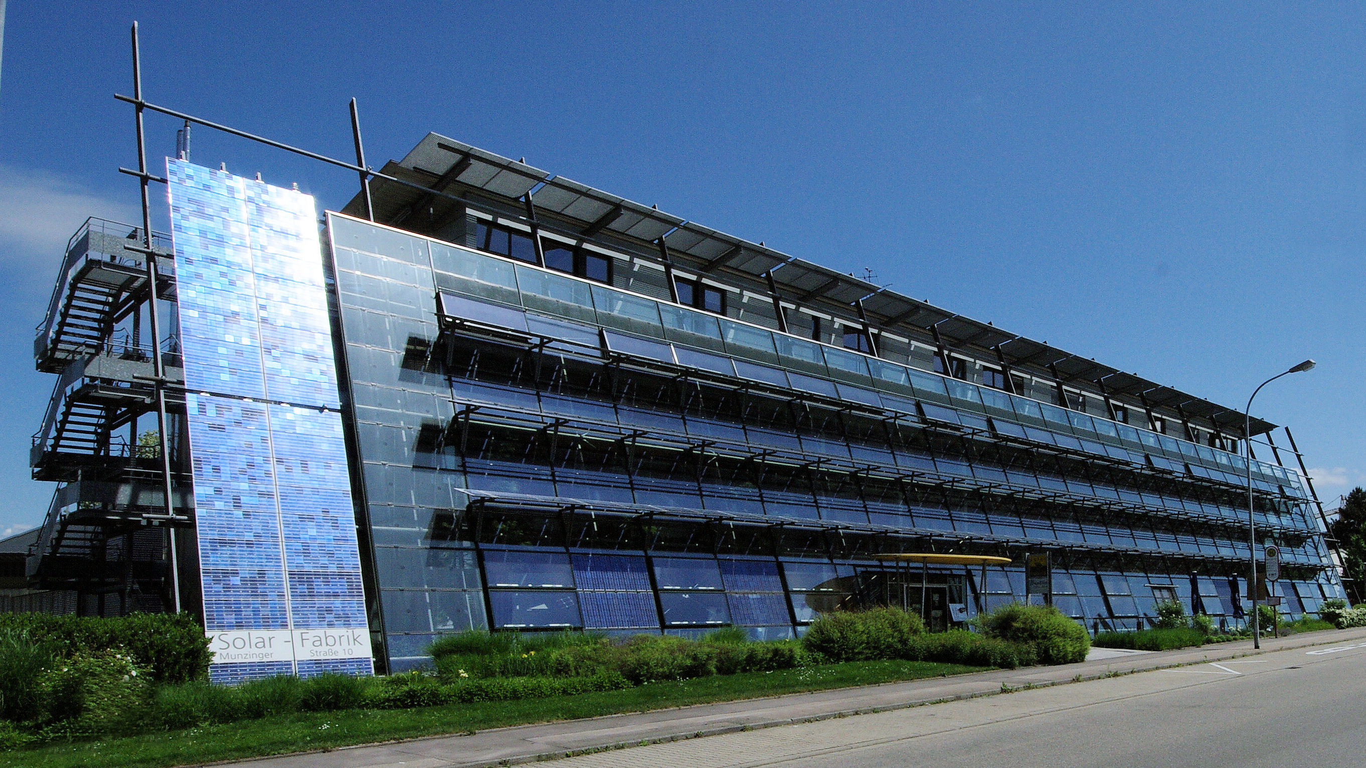 Solarfabrik Freiburg